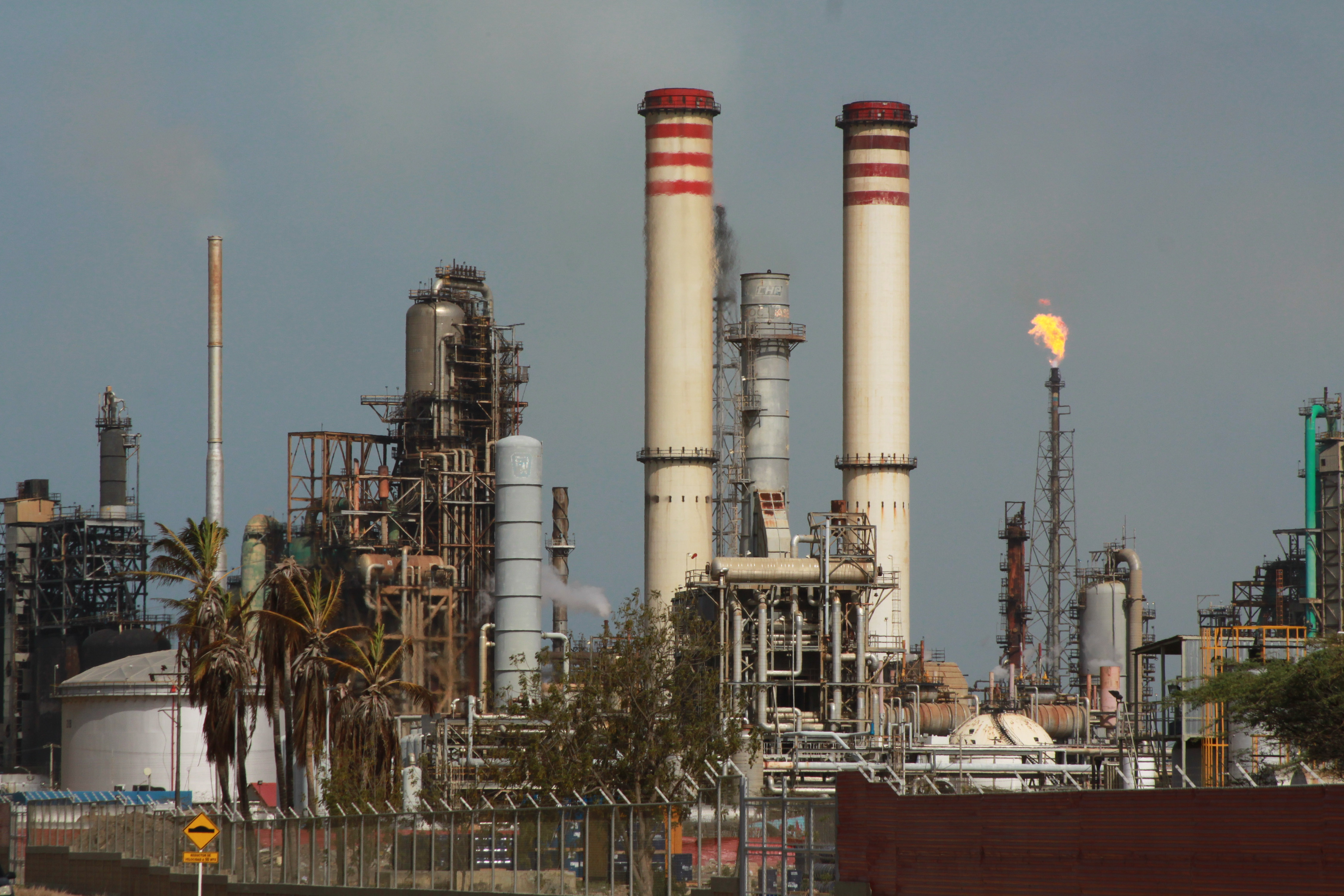 Complejo Refinador de Amuay